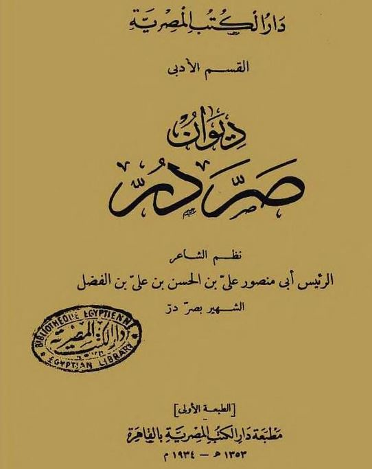 غلاف ديوان صردر، دار الكتب المصرية - عام ١٣٥٣ هـ / ١٩٣٤ م